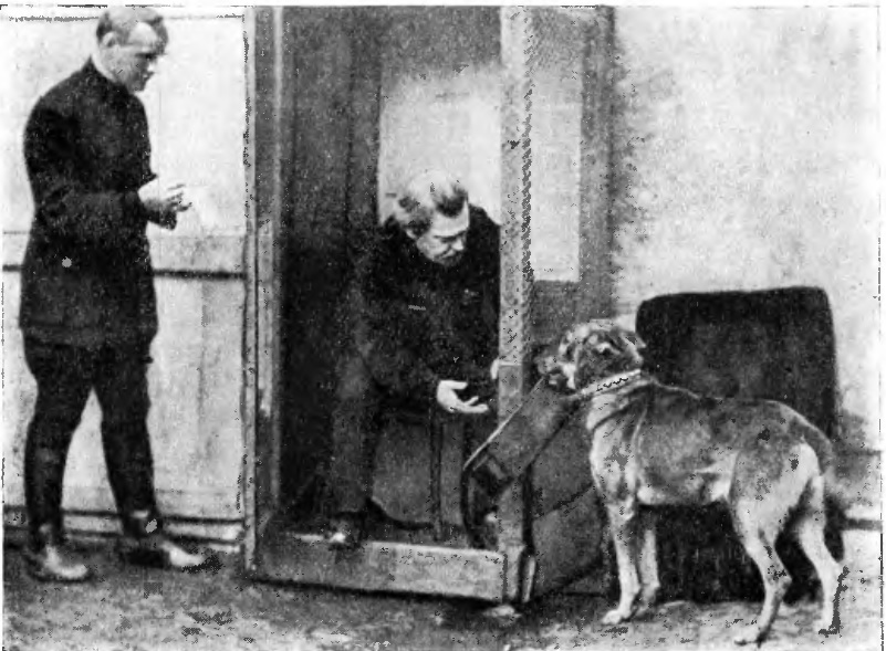 Коммутатор открыт. Собака "Марс" исполнила заданное внушение: принесла телефонный блокнот. Из книги В. Л. Дурова "Дрессировка животных" (М., 1924), с. 276.